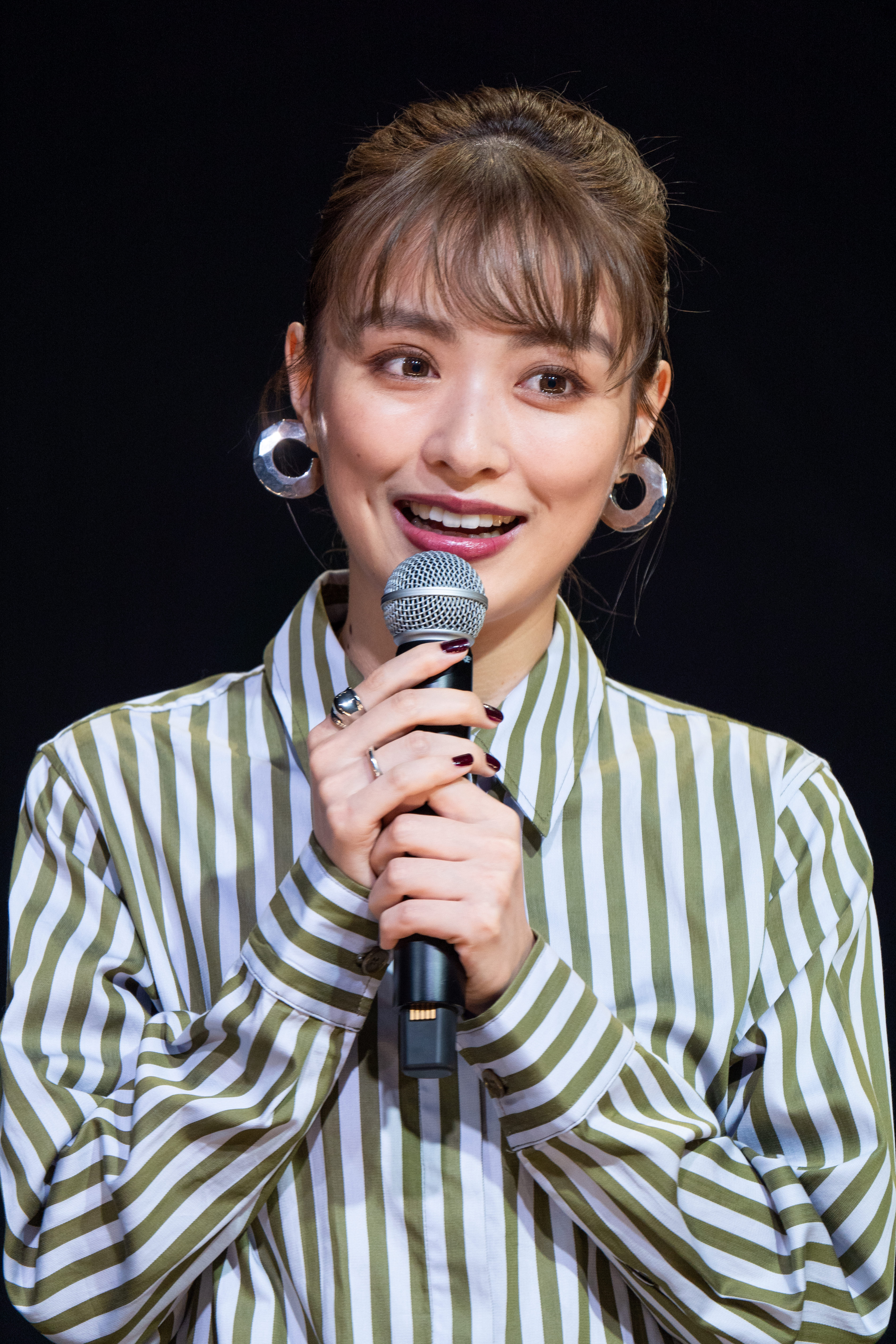 Super! C CHANNEL 2019 内田理央